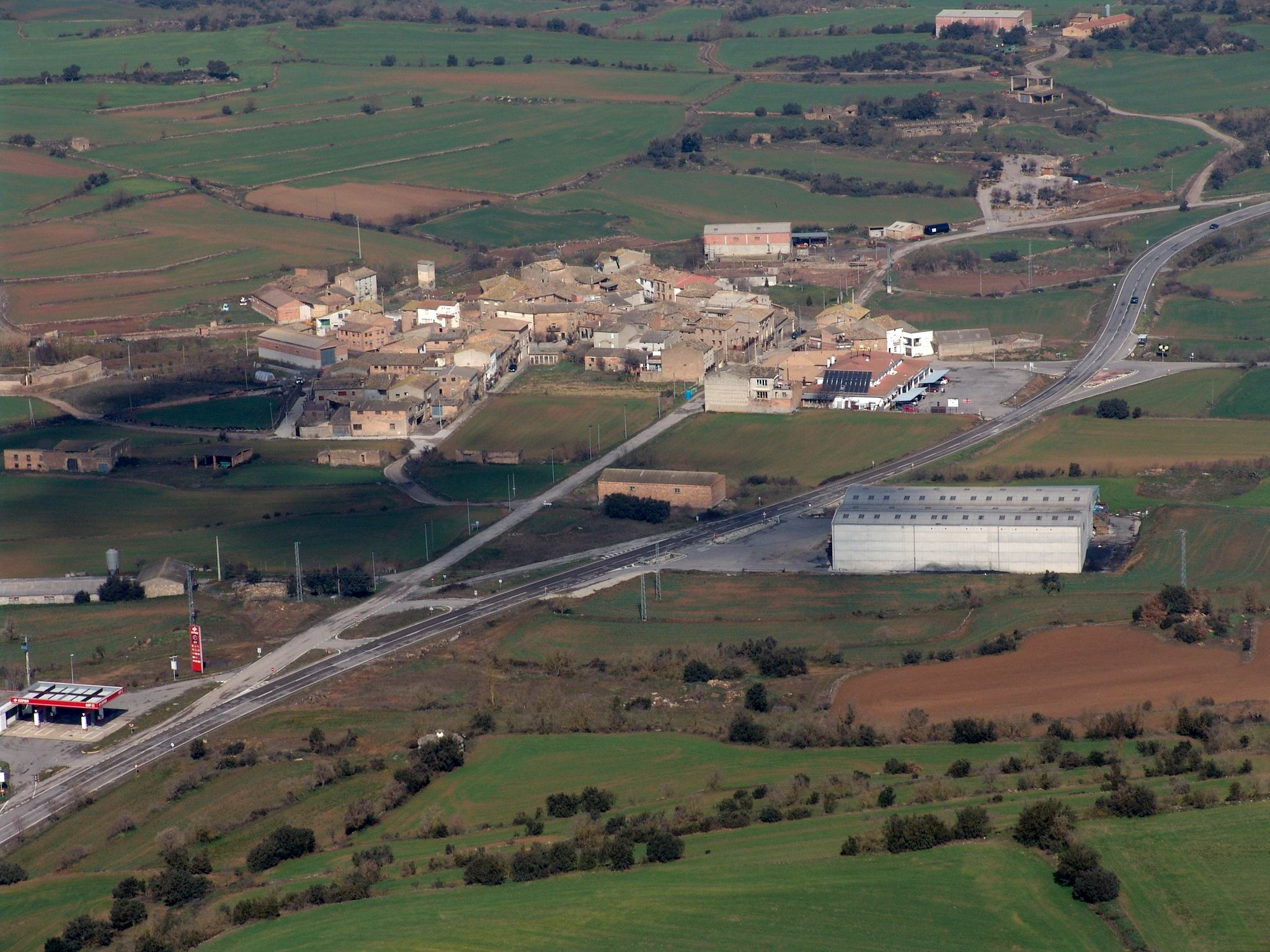 vista general de Cabanabona